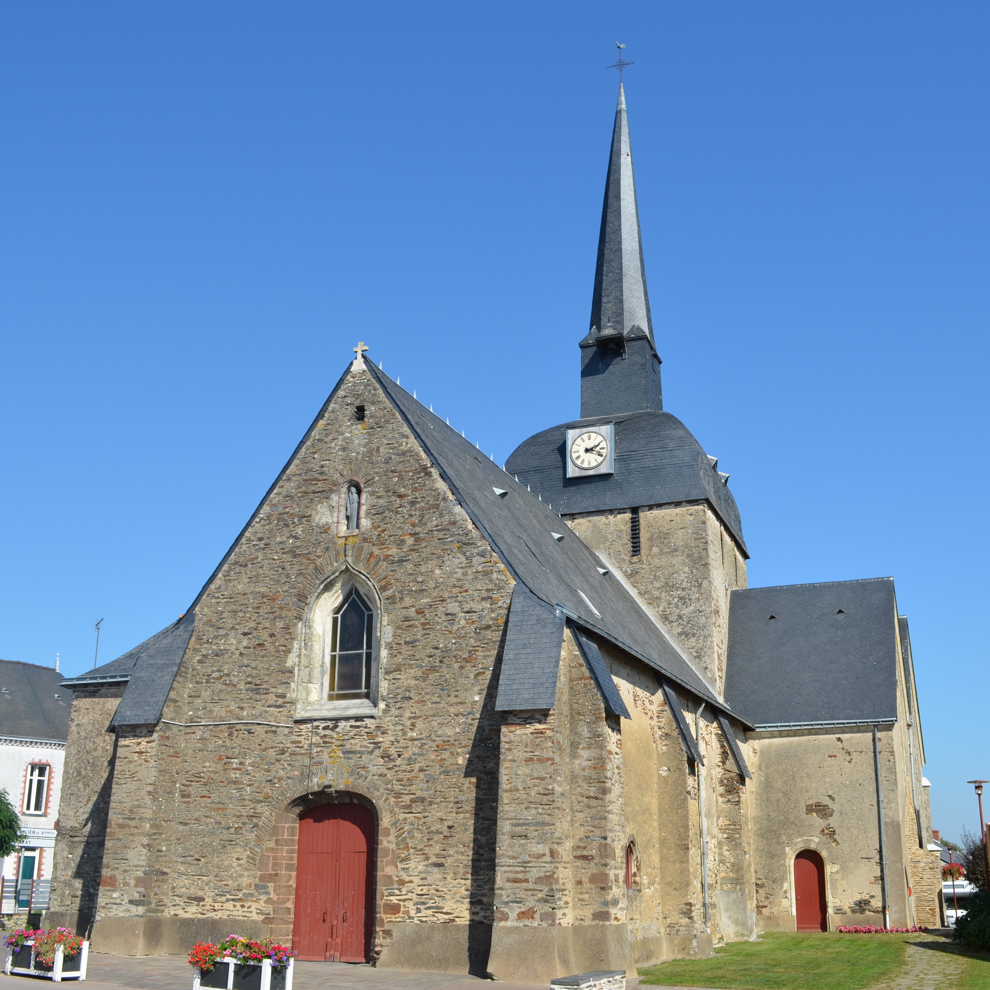 Église Saint-Jouin 11e s. - Moisdon-la-Rivière (Loire-Atlantique)